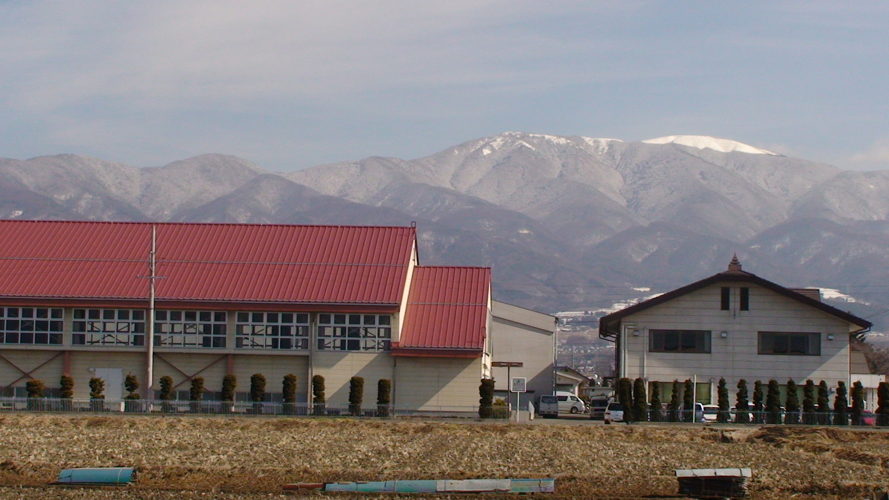 芳川体育館（左手前）・南部屋内運動場（左奥）・松本市役所芳川出張所（右）